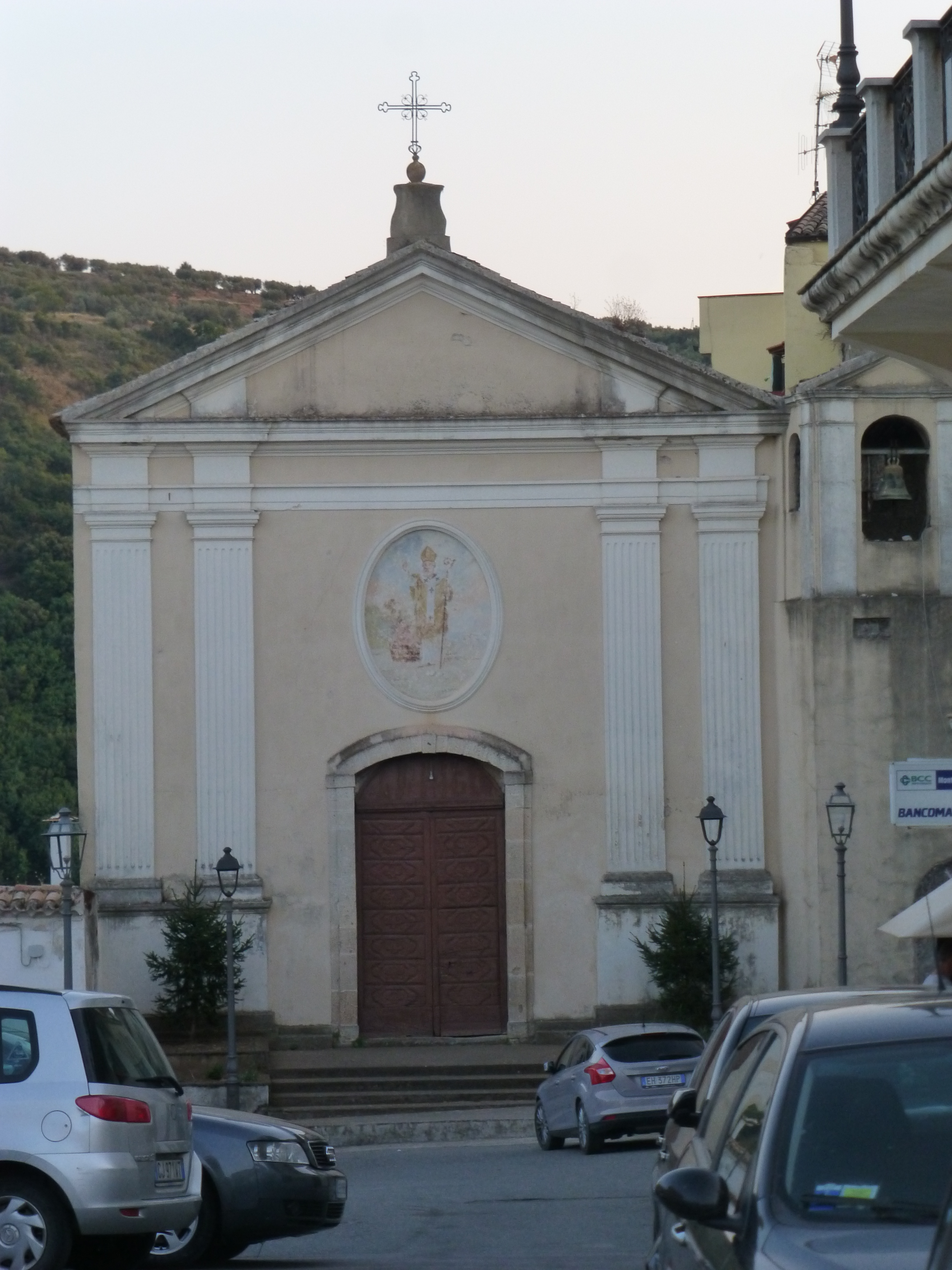 Chiesa di Squillace 2